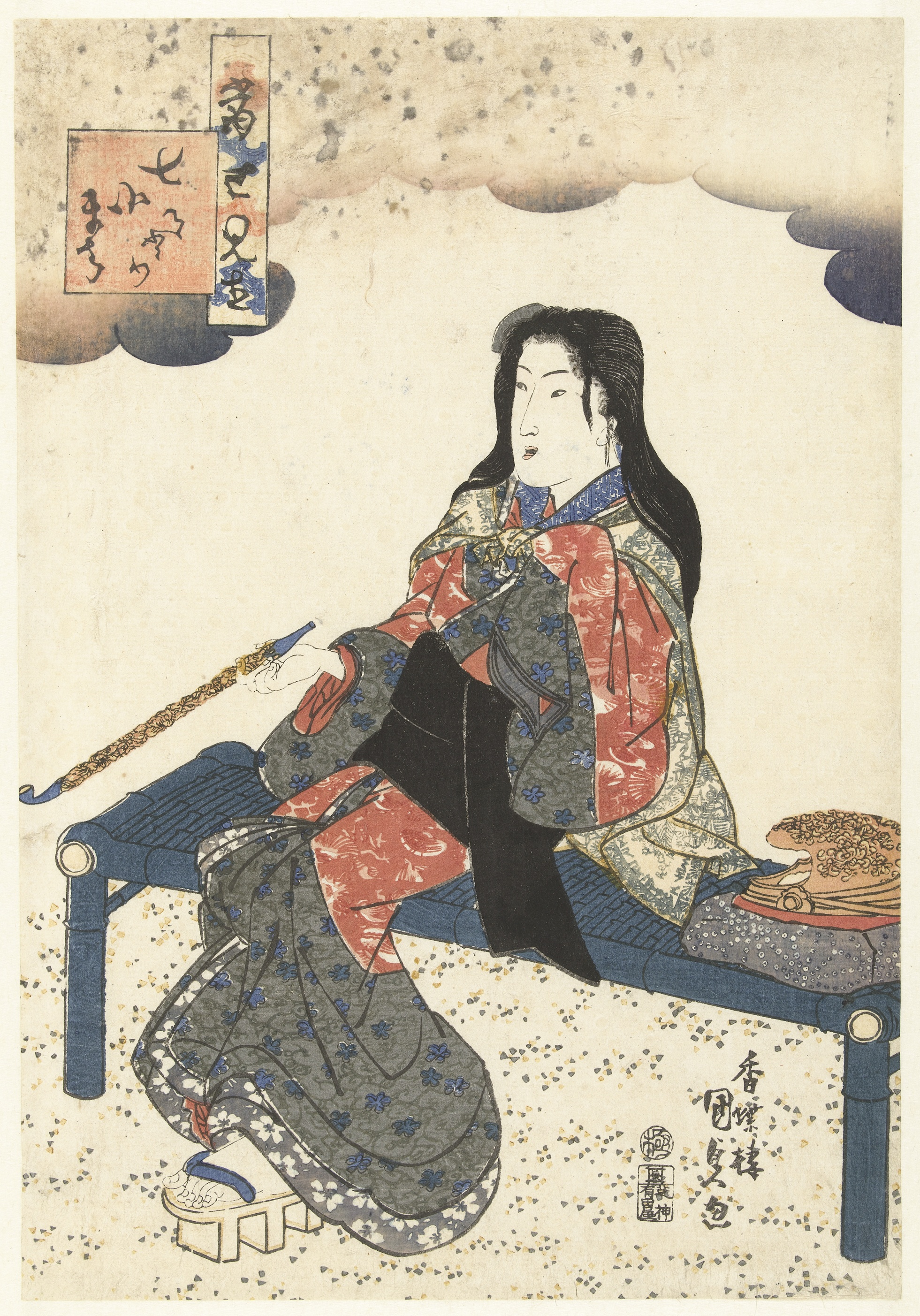 Vrouw met grote versierde pijp in rechter hand, zittend op blauwe bamboe bank onder gestileerd wolkpatroon. Label Line: mentioned on object Kunisada (I) , Utagawa (1786 - 1865), 1840 - 1845, kleurenhoutsnede; lijnblok in zwart met kleurblokken Collection: prenten; Japan (collectie)